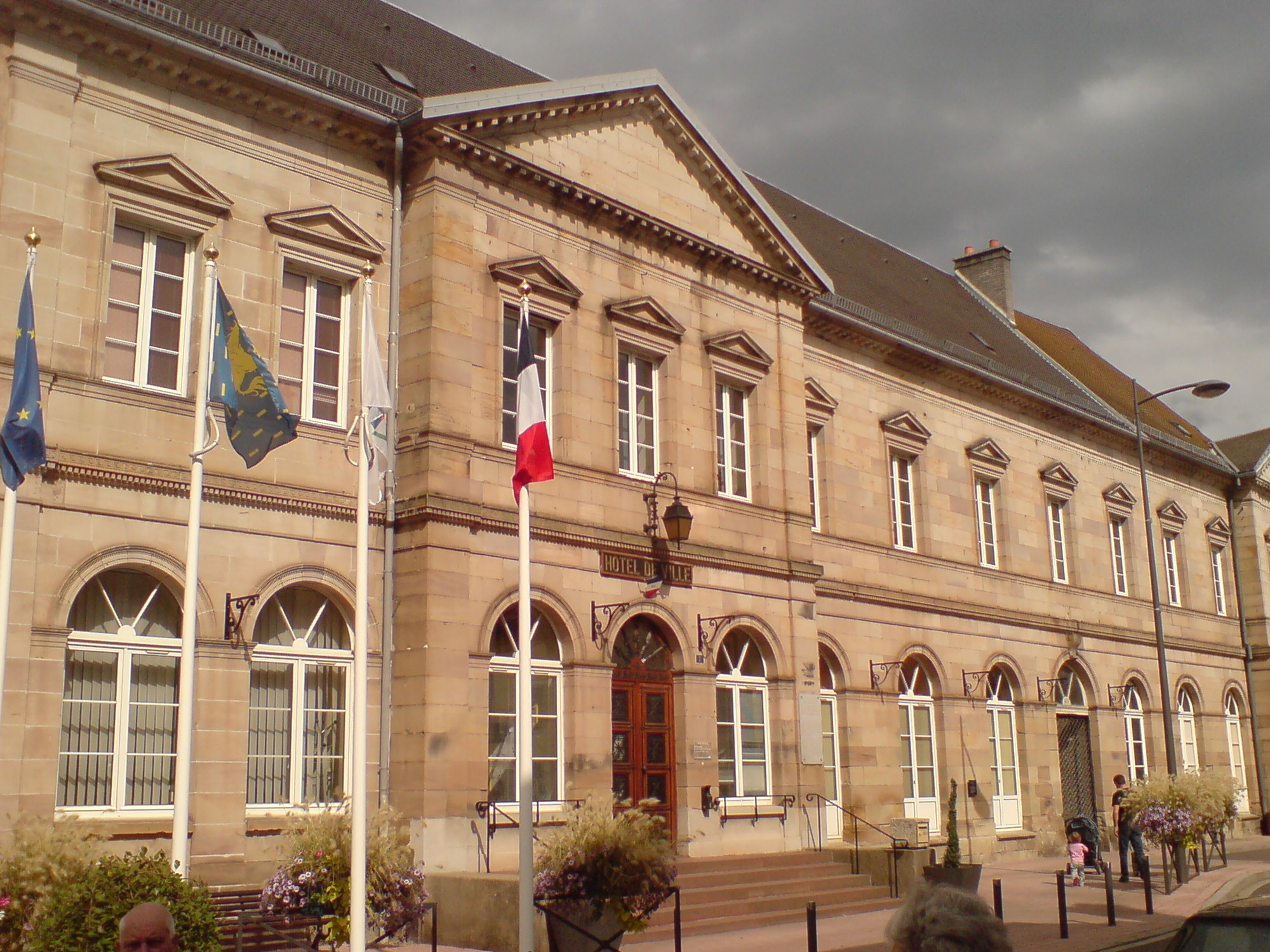 Vue oblique de la mairie du Lure, Haute-Saône.